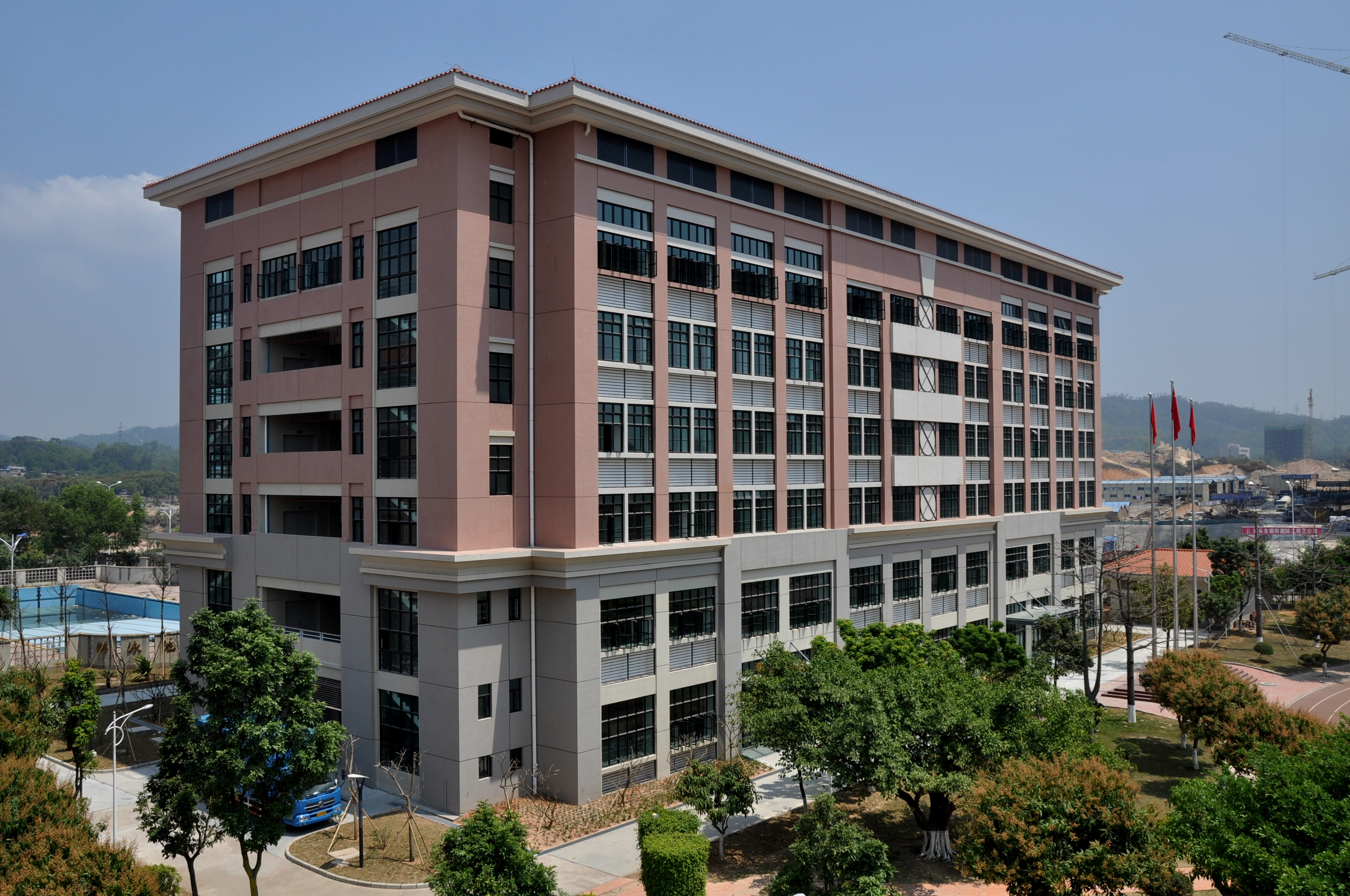 珠海一中综合楼